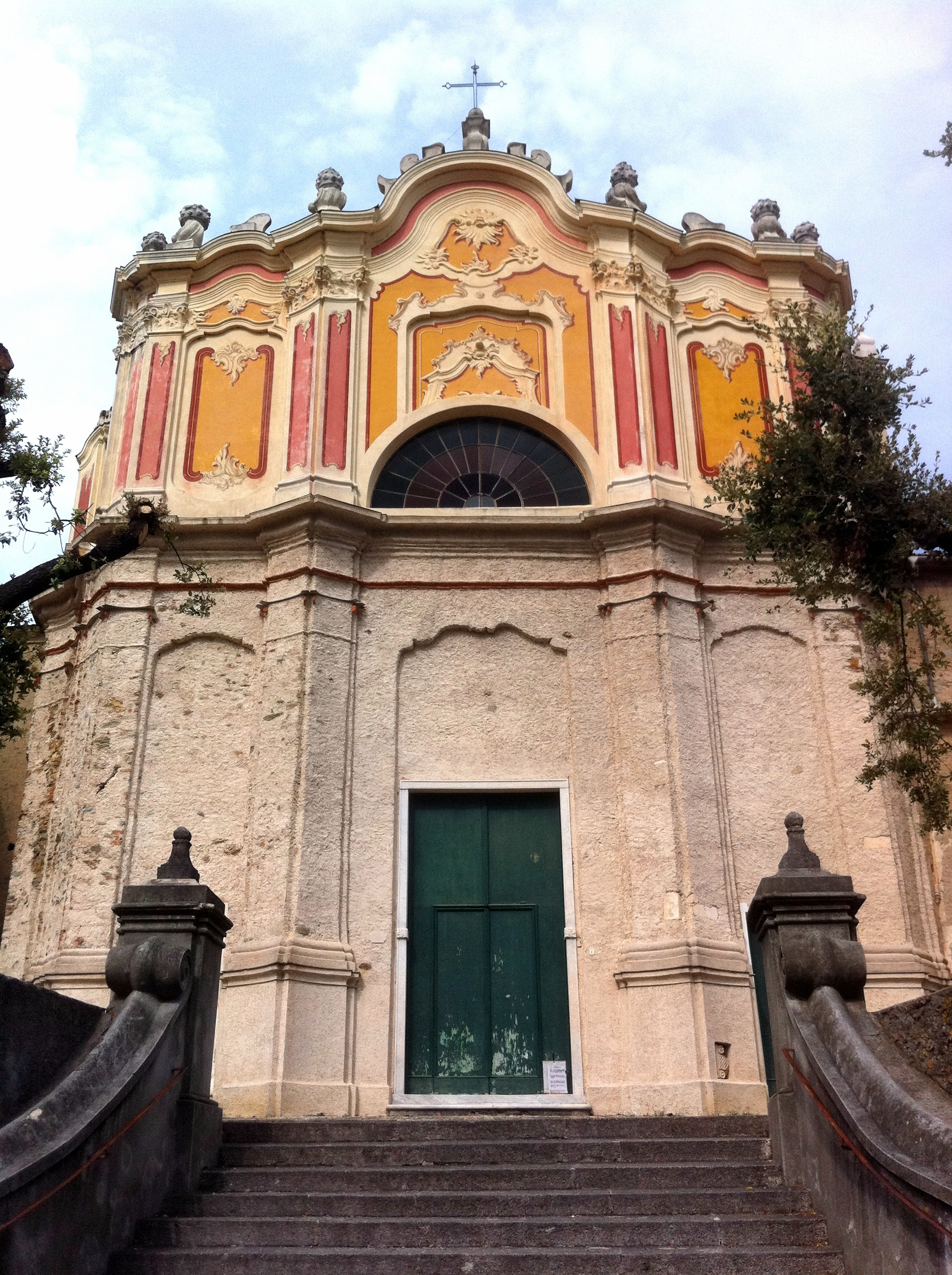 Chieas di San Nicolò Calice Ligure (SV) Italy